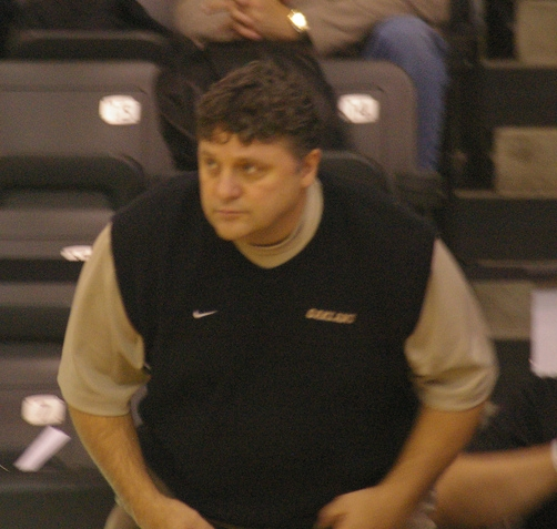 Greg Kampe